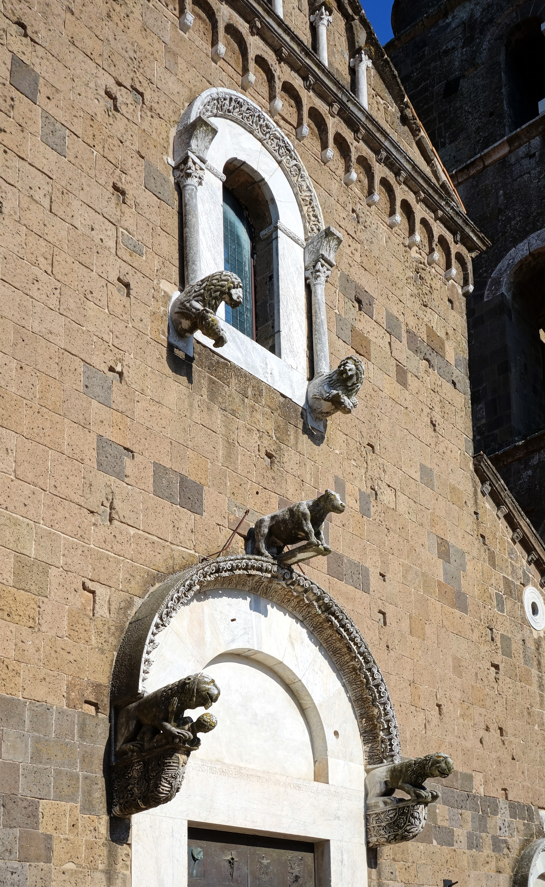 Le porche du Duomo de Casertavecchia.